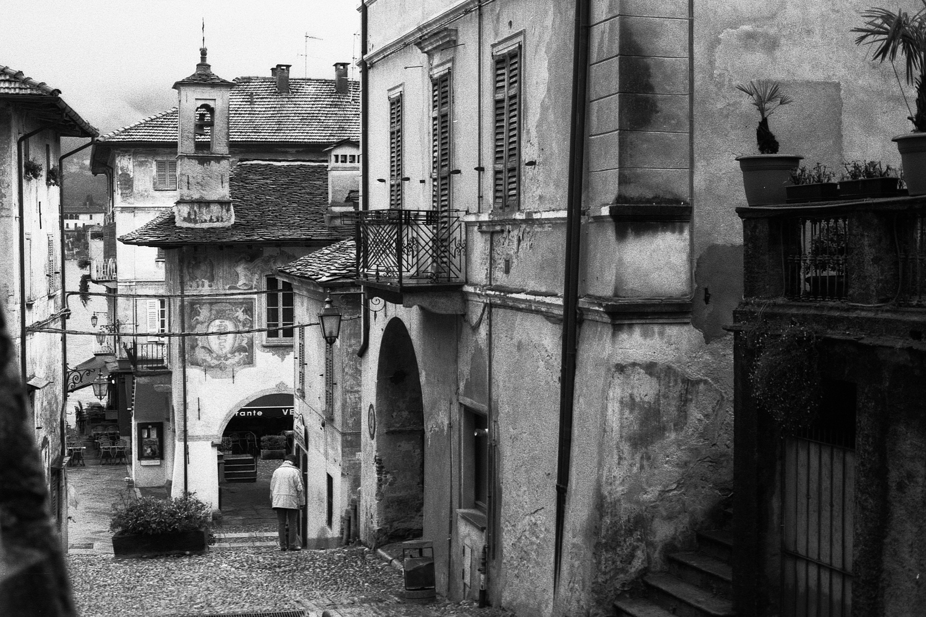 Orta San Giulio, Piemonte, Italia